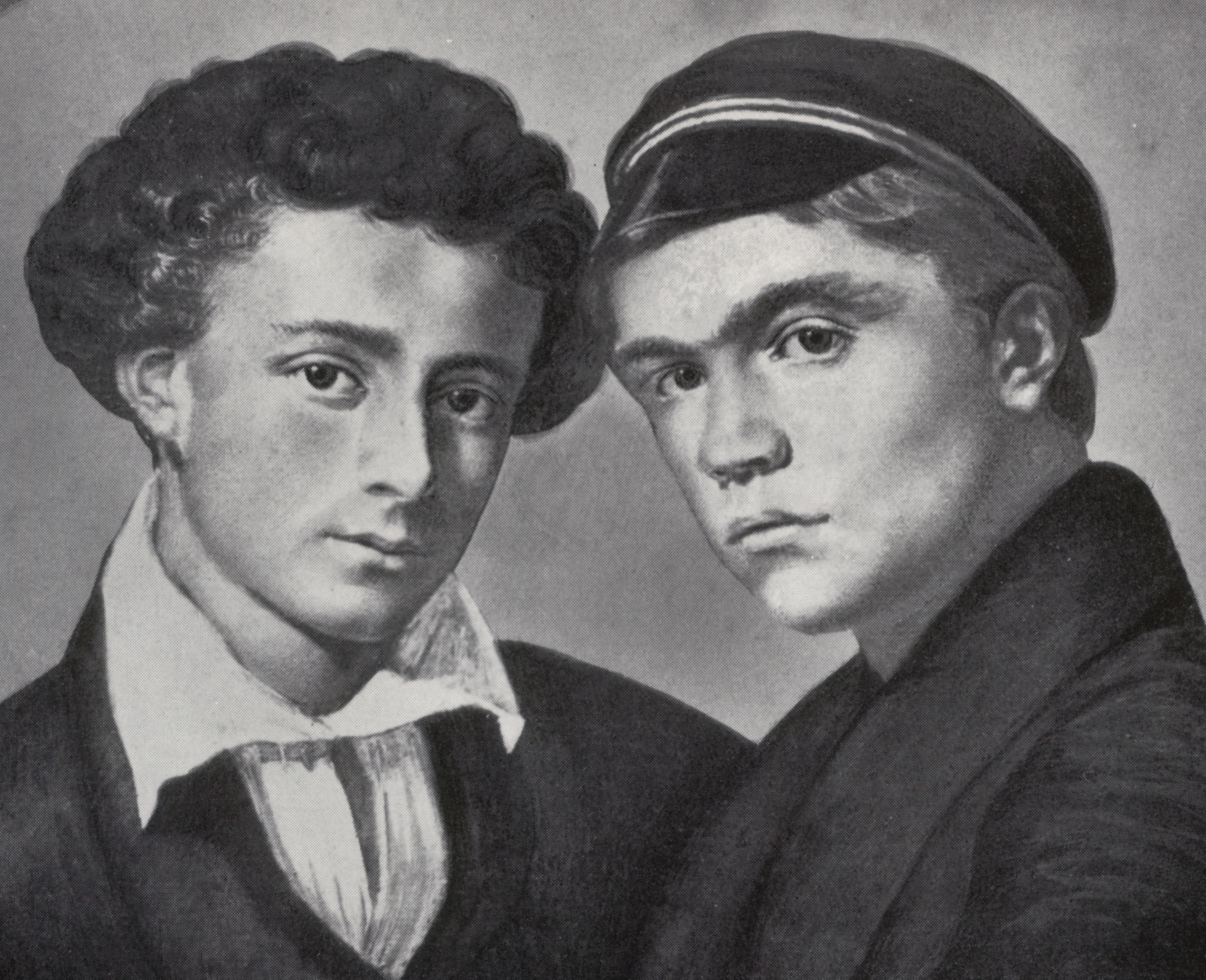 Friedrich Mosbrugger Doppelbildnis Gebhard Leyherr und Carl Hüetlin (Mütze) als Studenten 1823 verschollen Fotografie